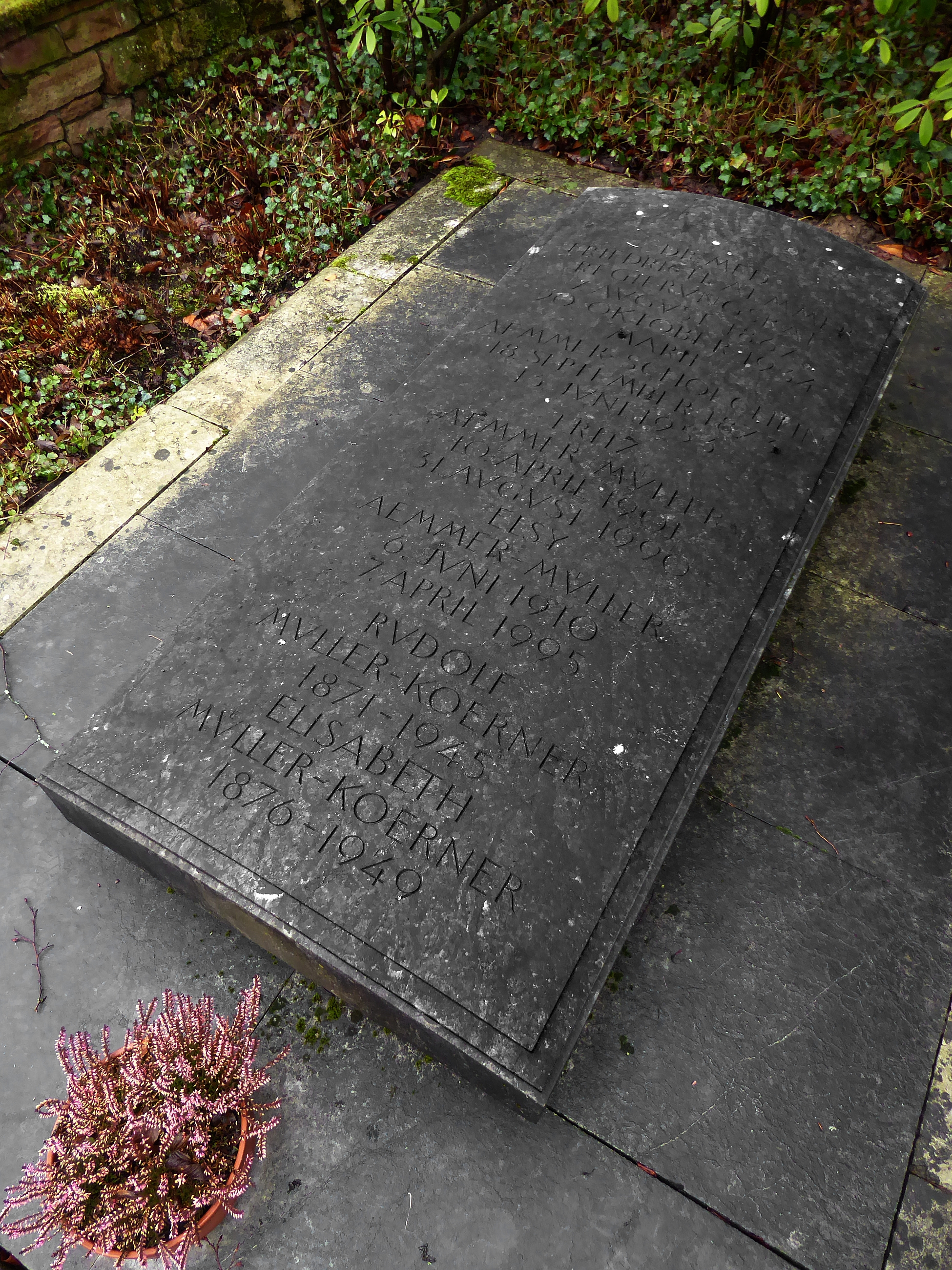 Friedrich Ämmer-Schöchlin (1867–1934), Dr.med., Vorsteher des Gesundheitsamts, Regierungsrat, Familiengrab auf dem Friedhof Hörnli, Riehen, Basel-Stadt